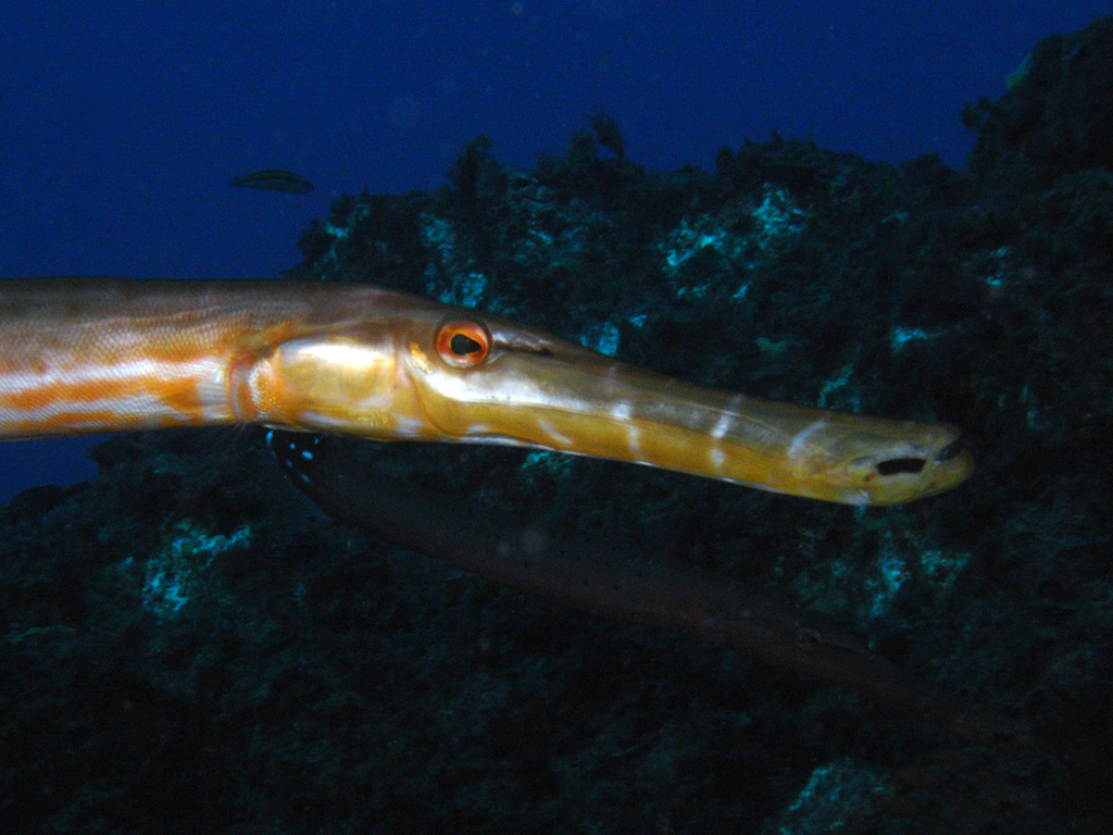 Aulostomus strigosus - Atlantic cornetfish / pez trompeta / poisson trompette, el Hierro.